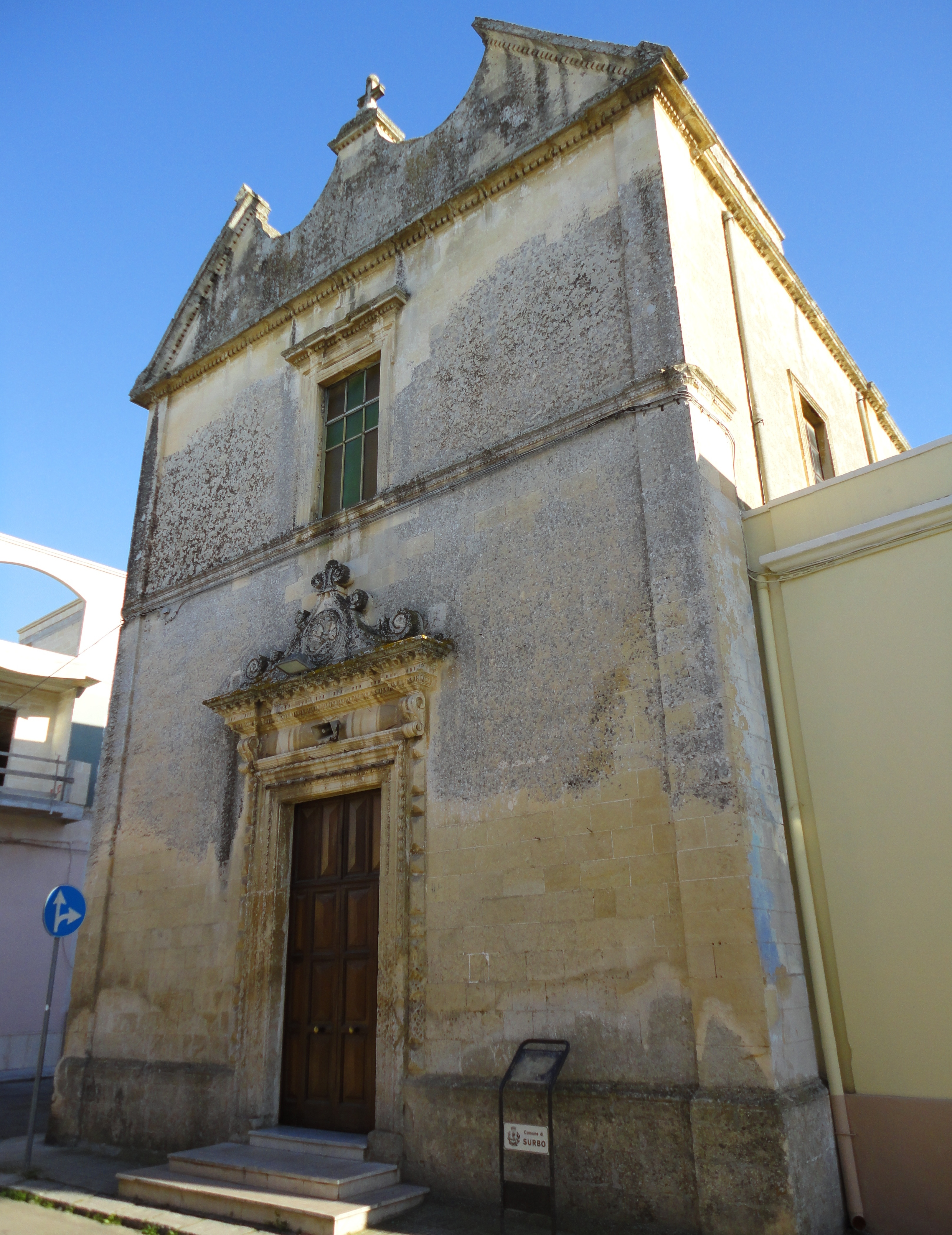 Chiesa di San Giuseppe Surbo, Lecce